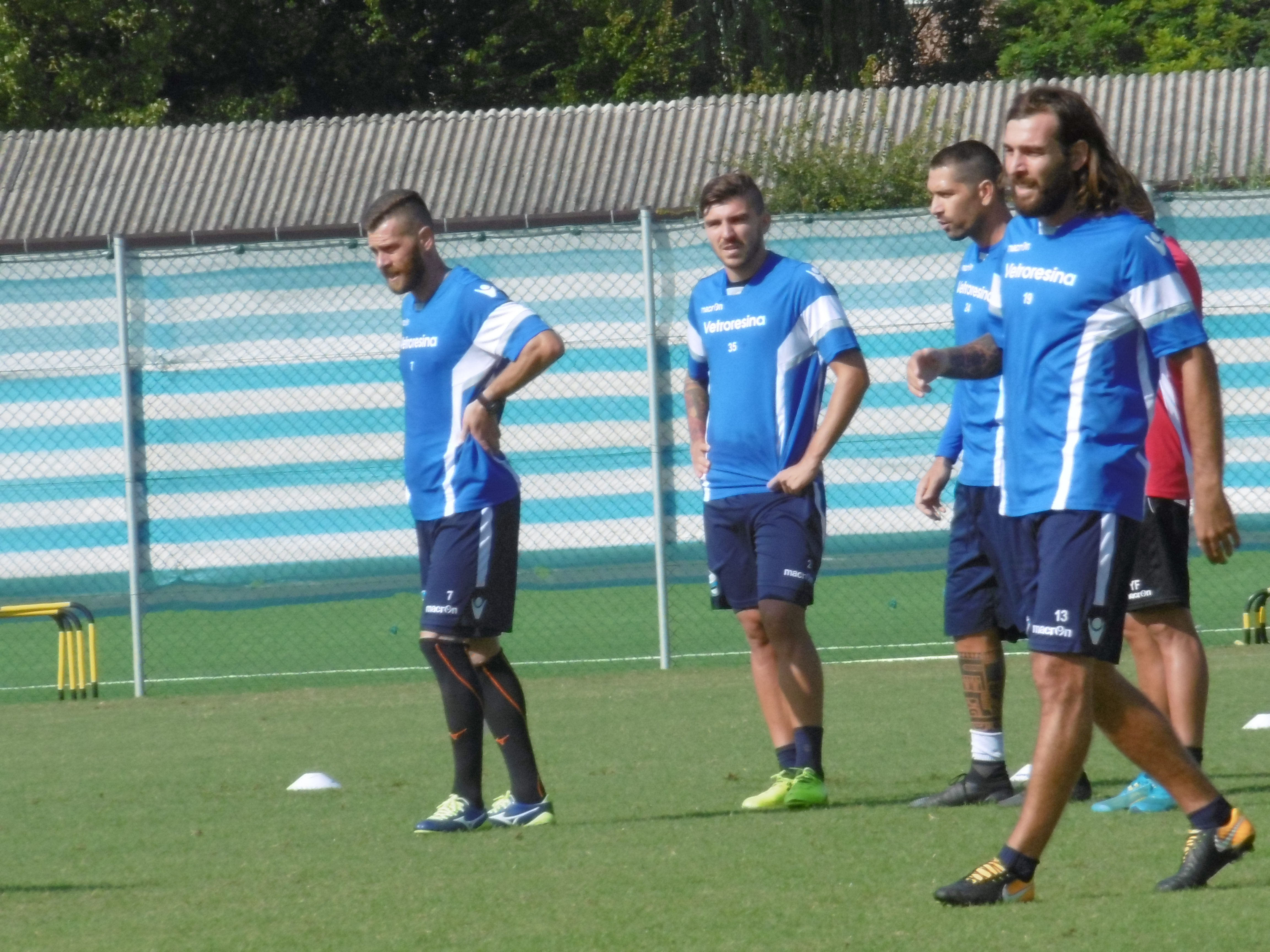 Mirco Antenucci, Alberto Paloschi, Marco Borriello e Luca Mora